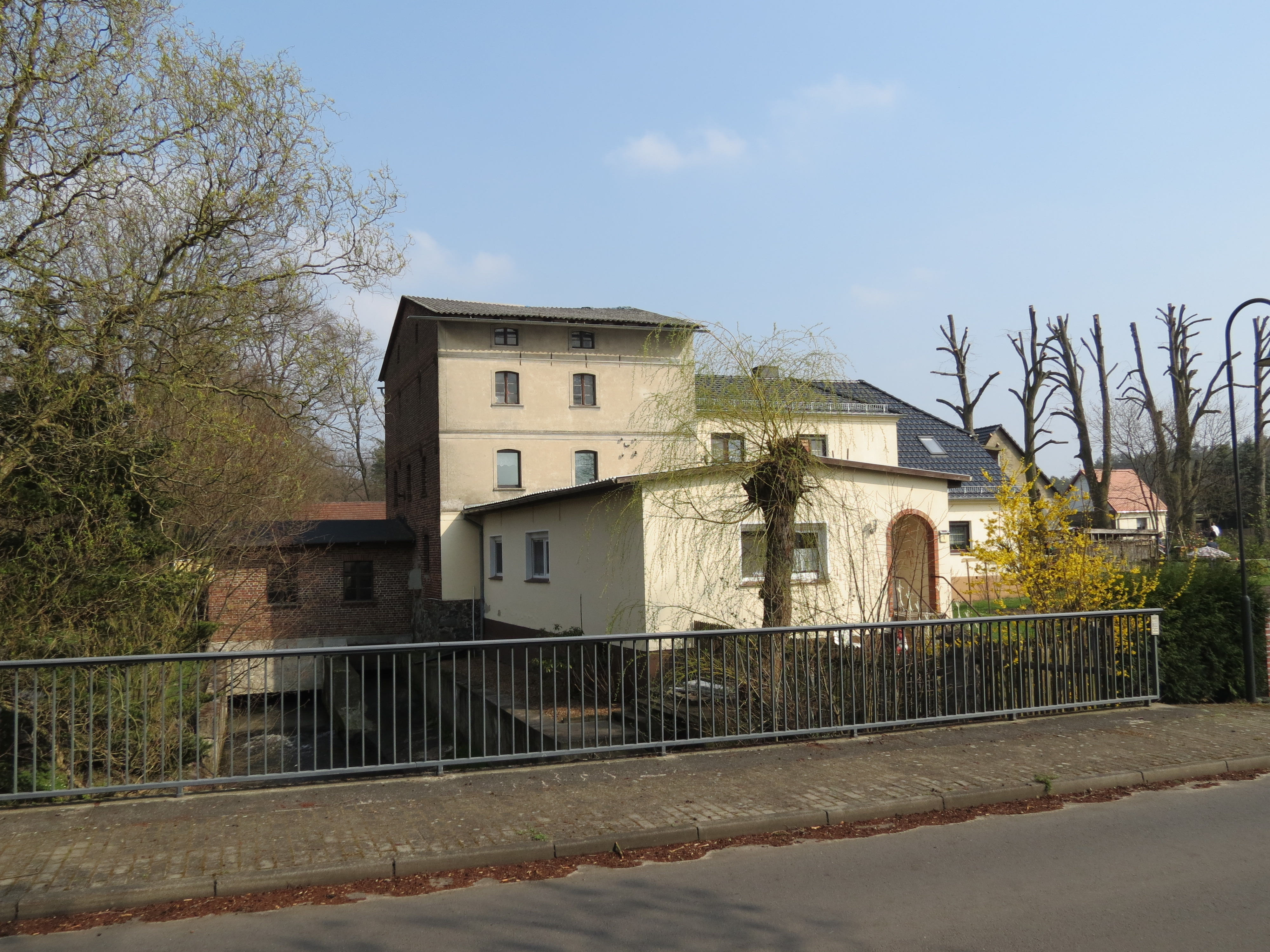 Doberburg, Ortsteil der Stadt Lieberose, Lkr. Dahme-Spreewald, Brandenburg, Deutschland, ehemalige Wassermühle